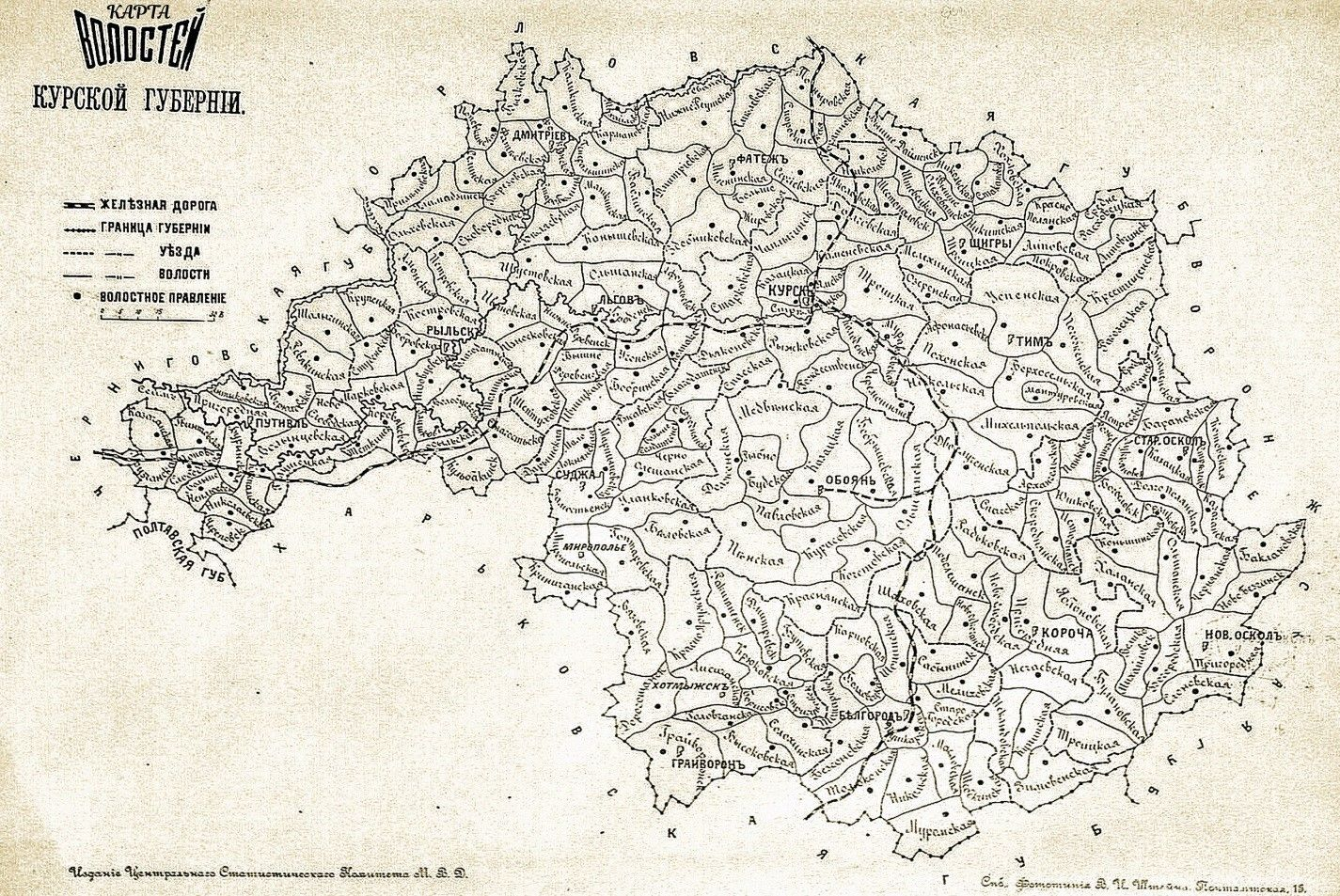 Карта волостей Курской губернии